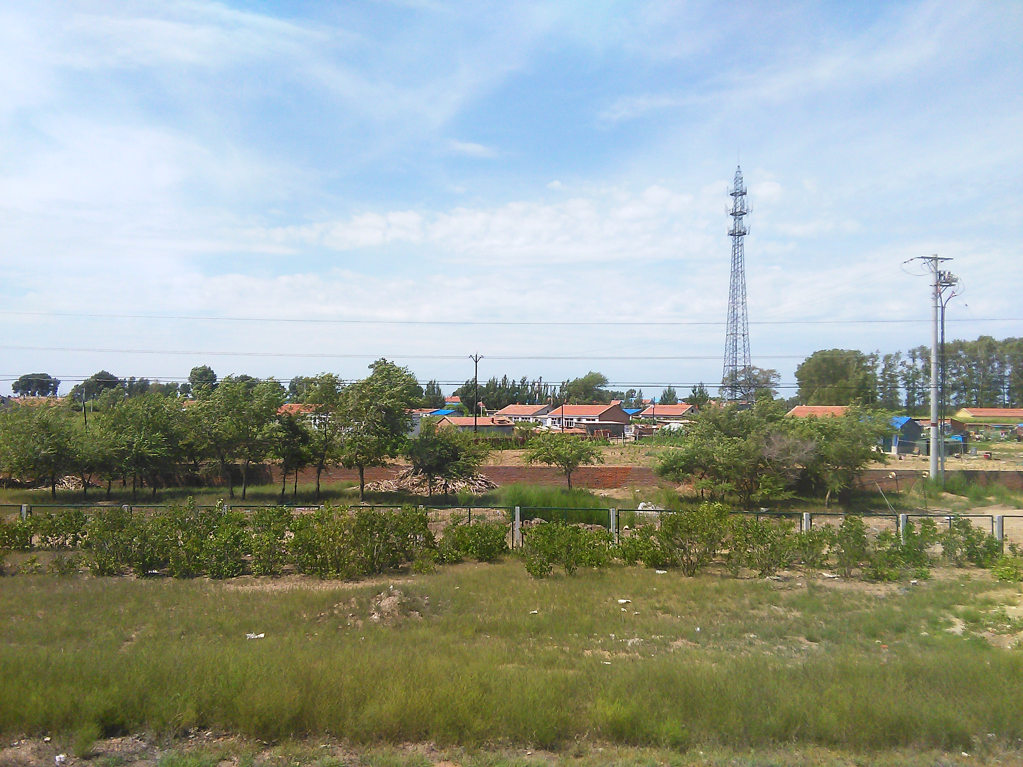 中文（中国大陆）: 克利镇农村2017夏，铁路附近